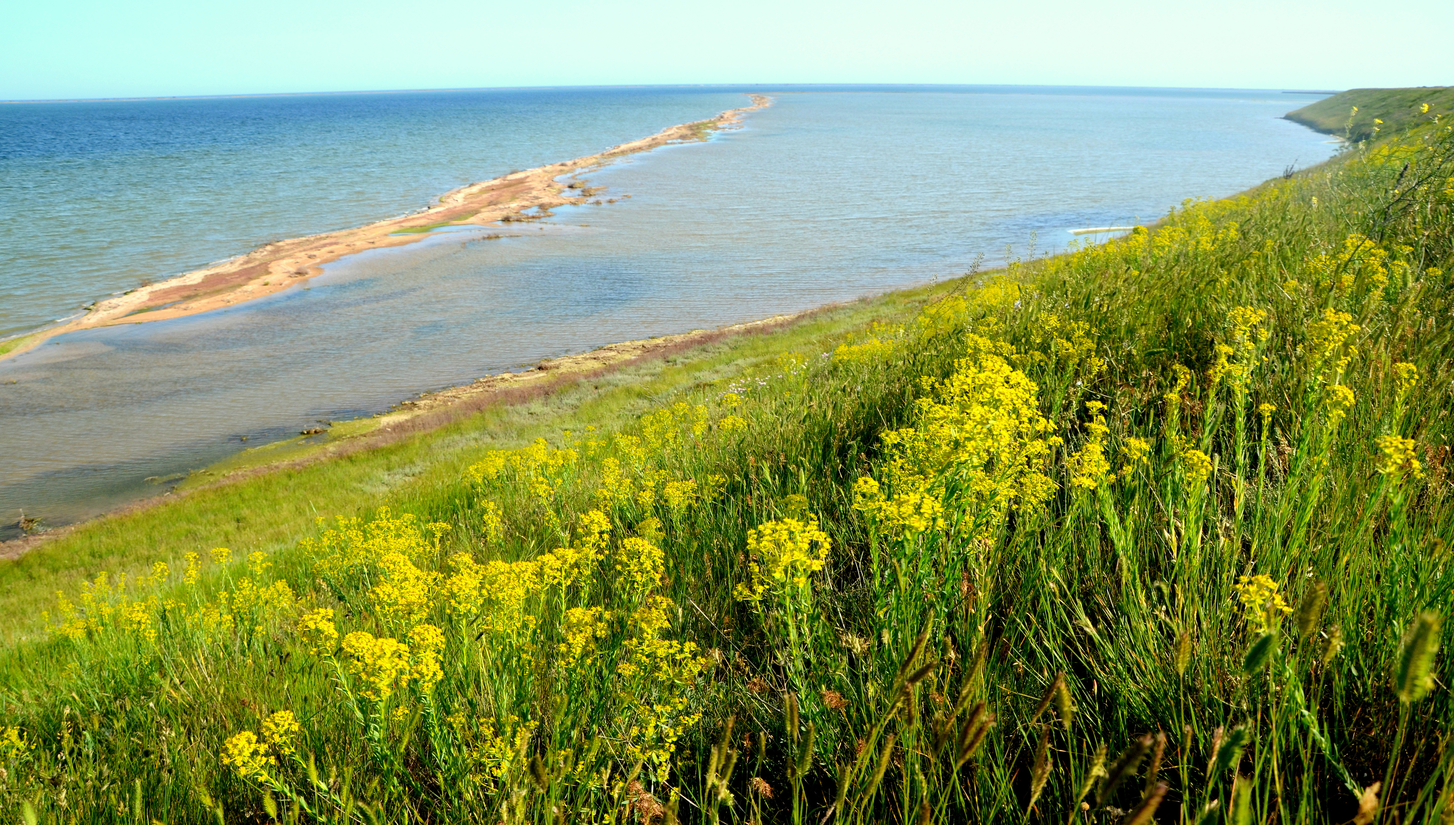 «Тузловські лимани», Татарбунарський район